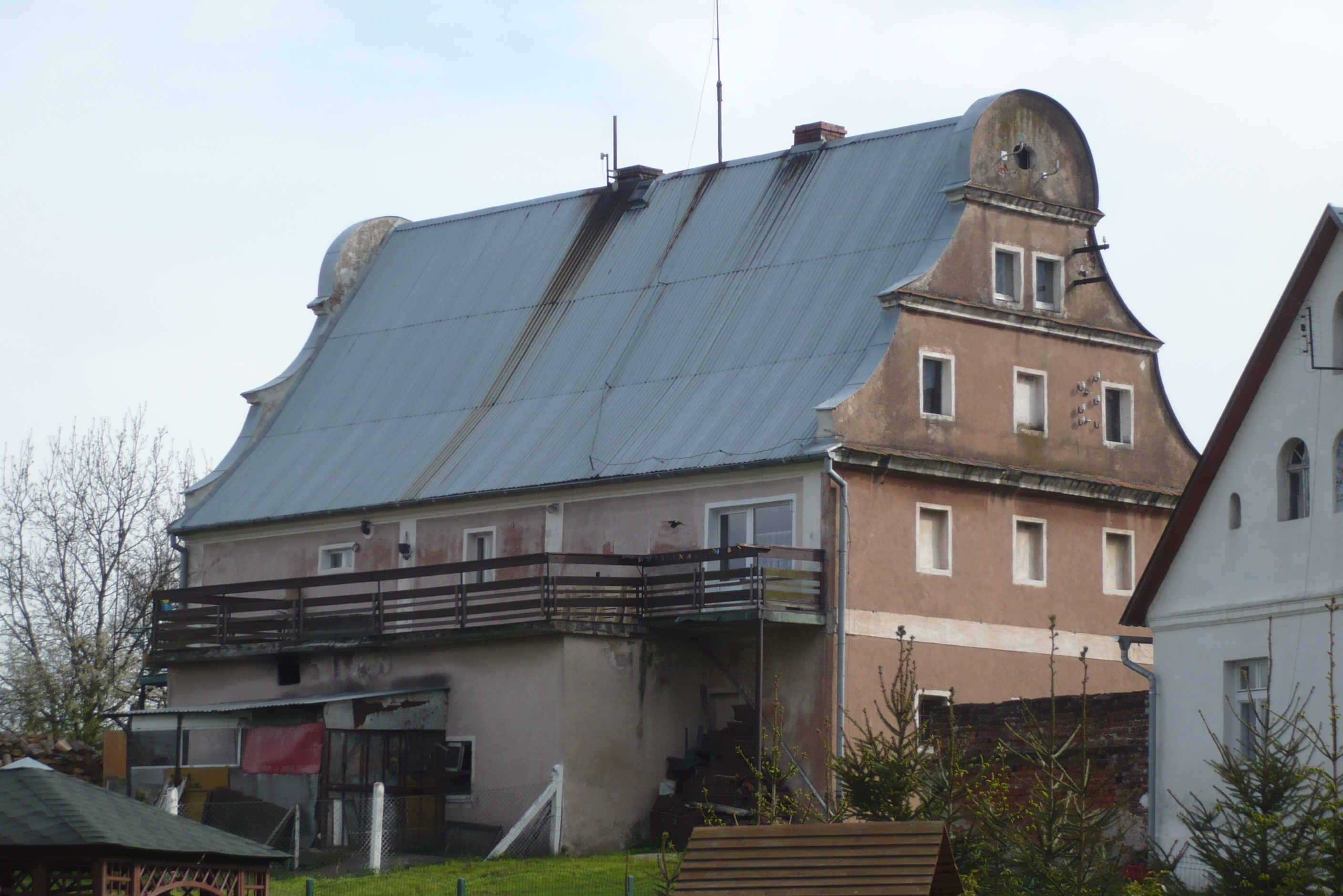 Dom w Korytowie